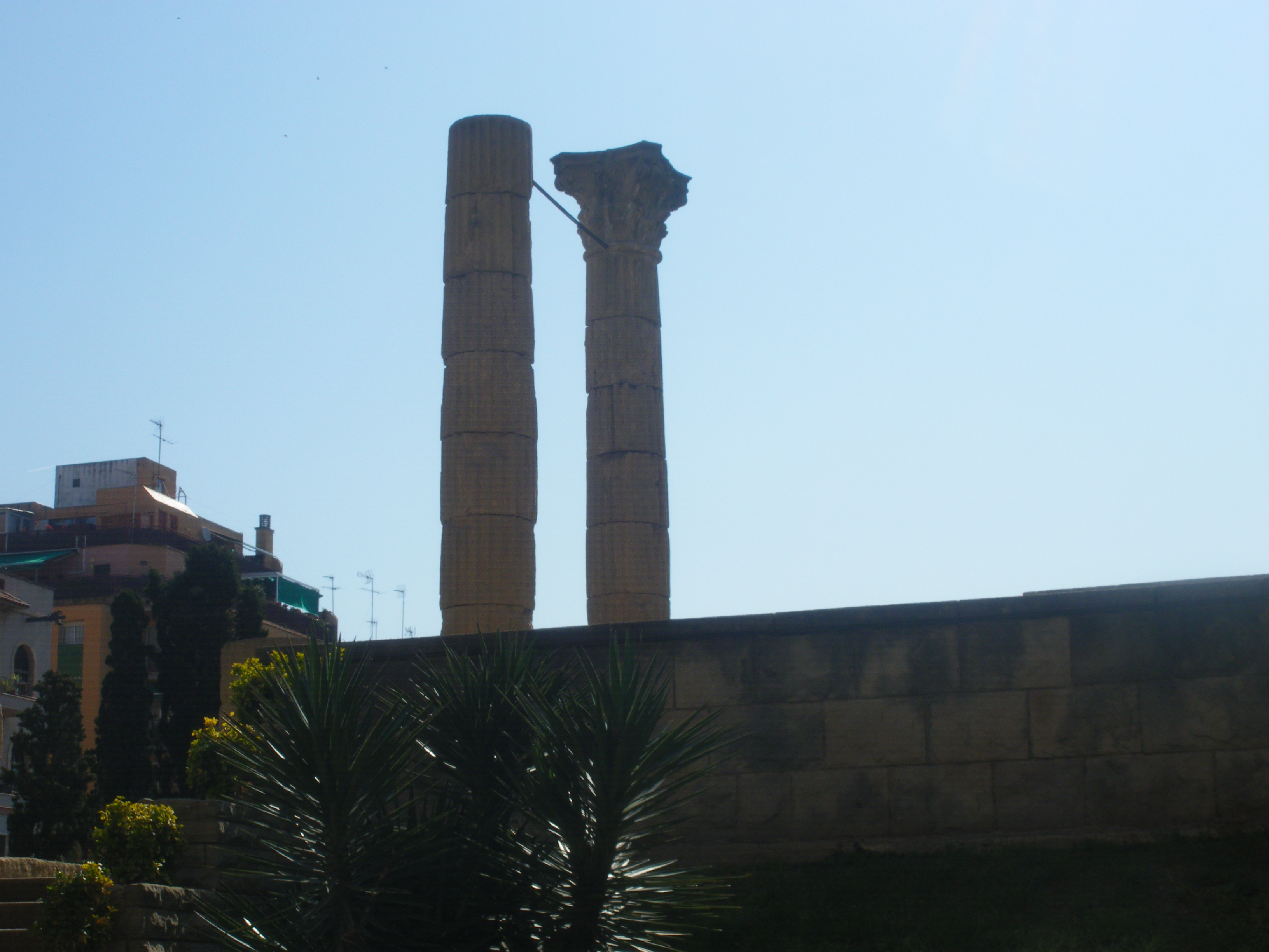 Dues columnes del Fòrum de la Colònia de Tarragona.